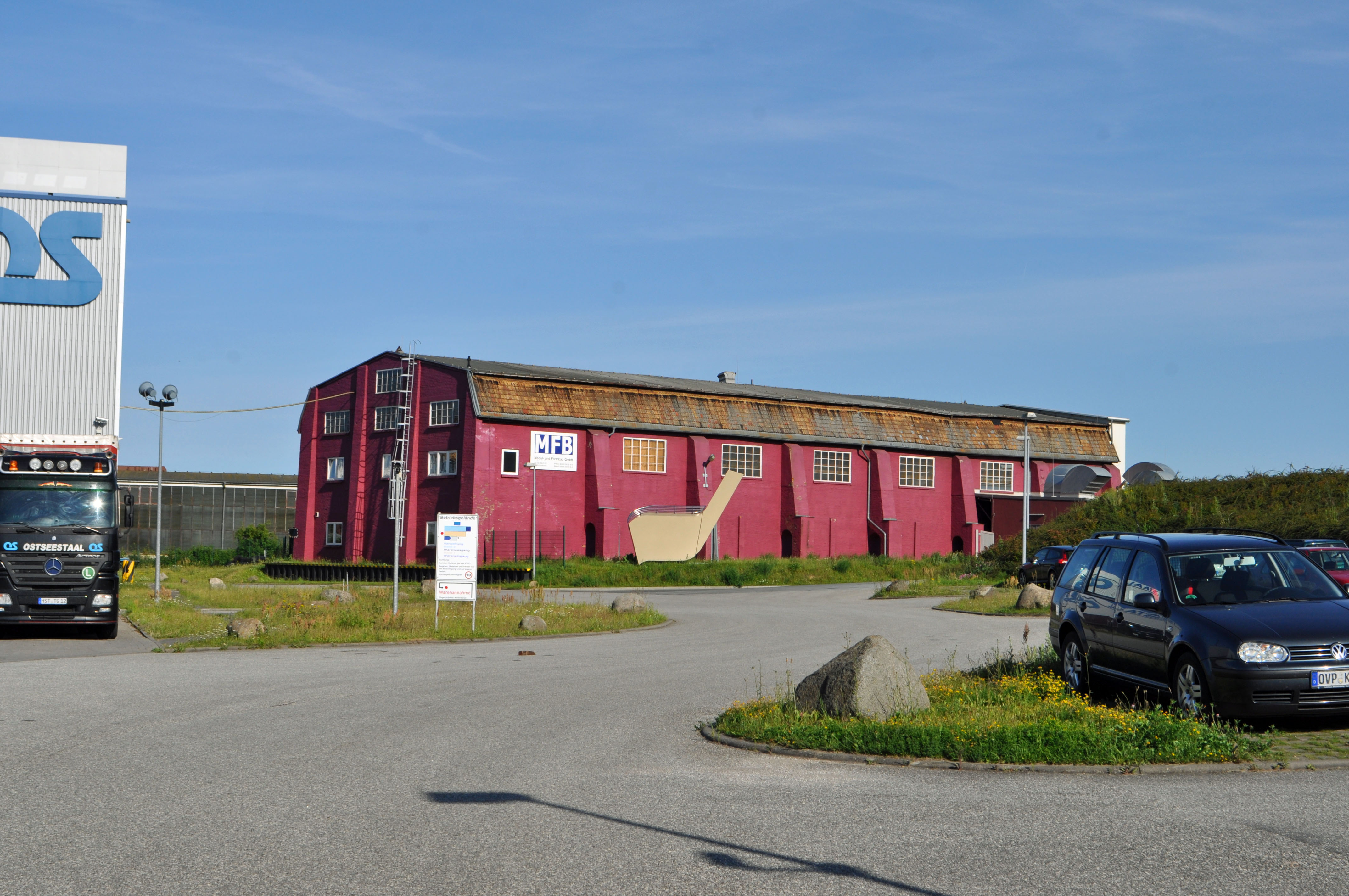 Stralsund, Ostseestaal GmbH, Halle der MFB GmbH; ehemals Werkhalle der Volkswerft